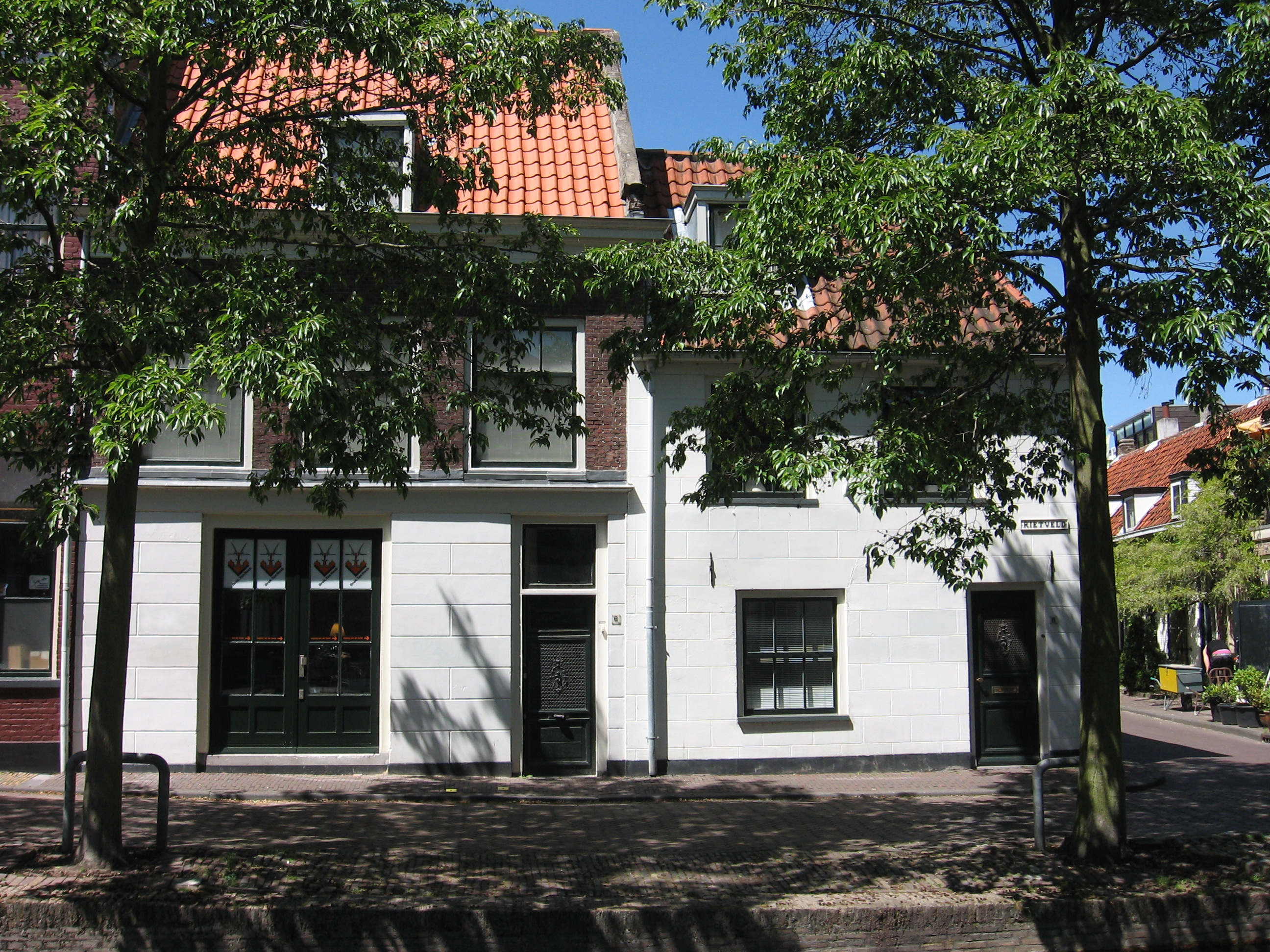 Delft - Rietveld 6-8.jpg, rijksmonument